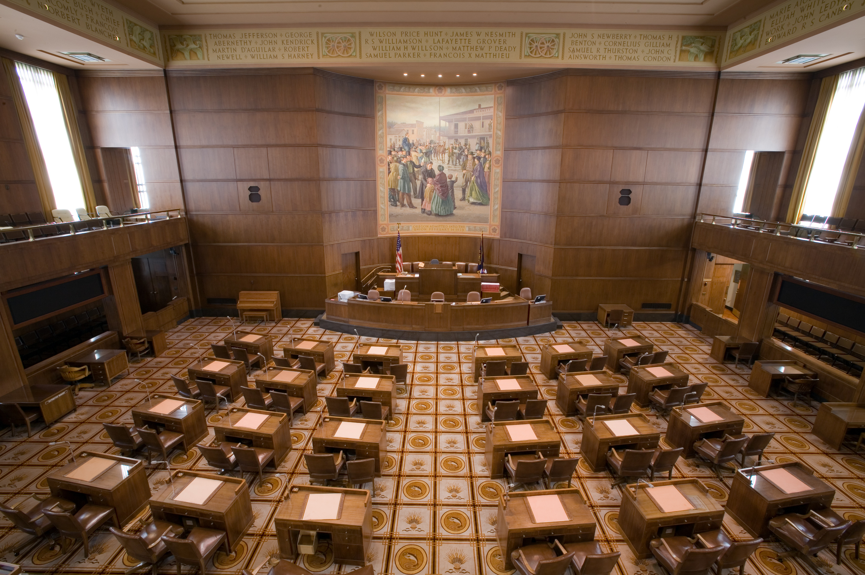 Oregon Senate Chambers.